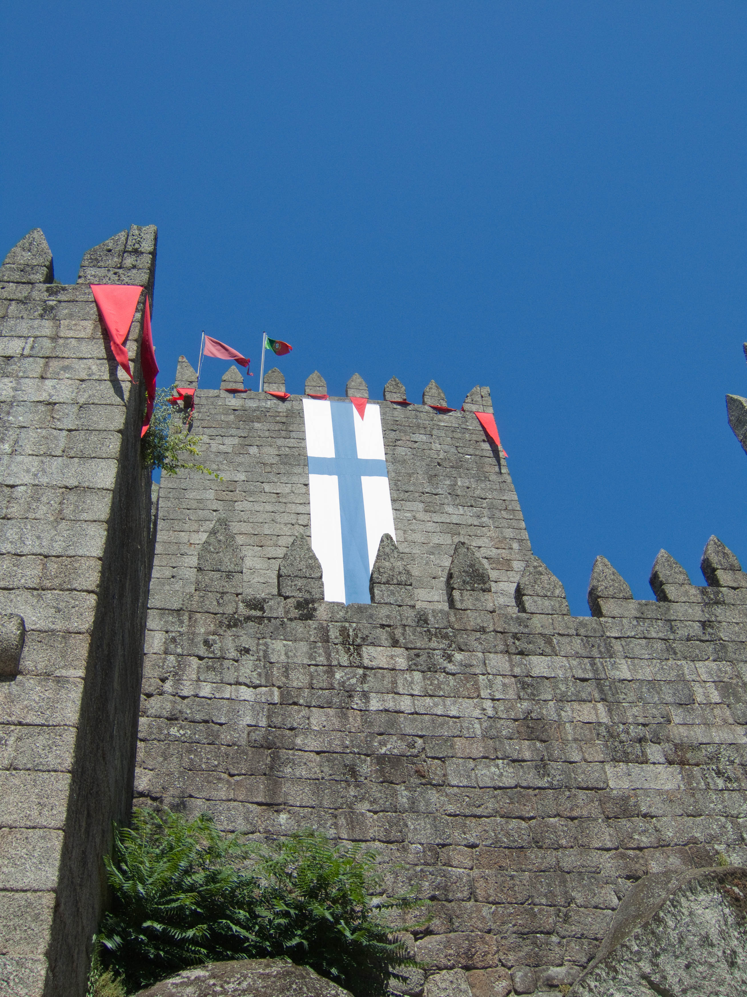 Exterior do Castelo de Guimarães aquando das comemorações da Batalha de São Mamede.